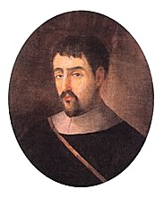 Matias de Albuquerque (1580-1647) foi Governador Geral do Brasil e Governador da Capitania de Pernambuco. Recebeu o título de Conde de Alegrete.